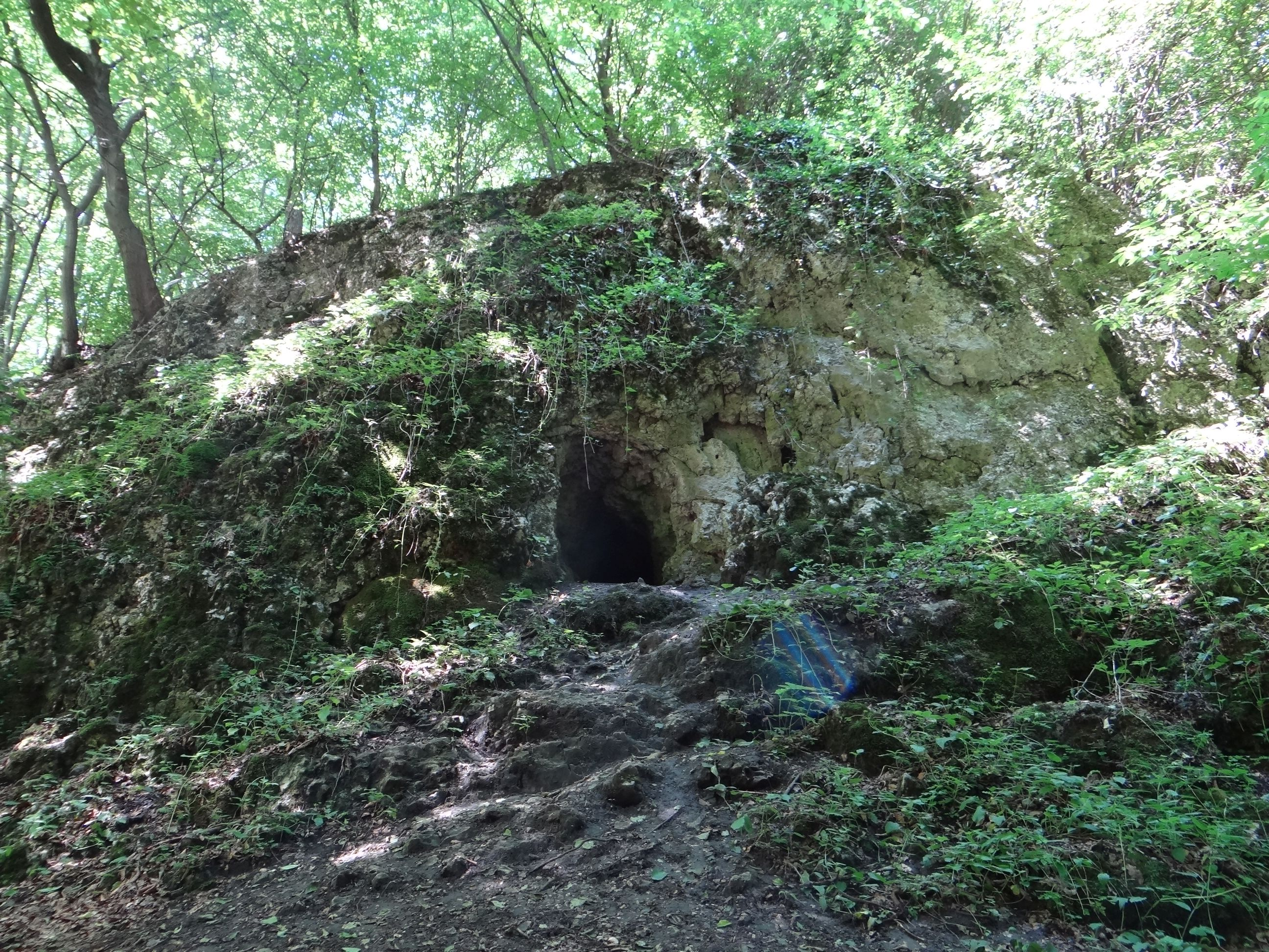 Jaskinia przy Kamyku (Jaskinia Pańskie Kąty) w Nielepicach